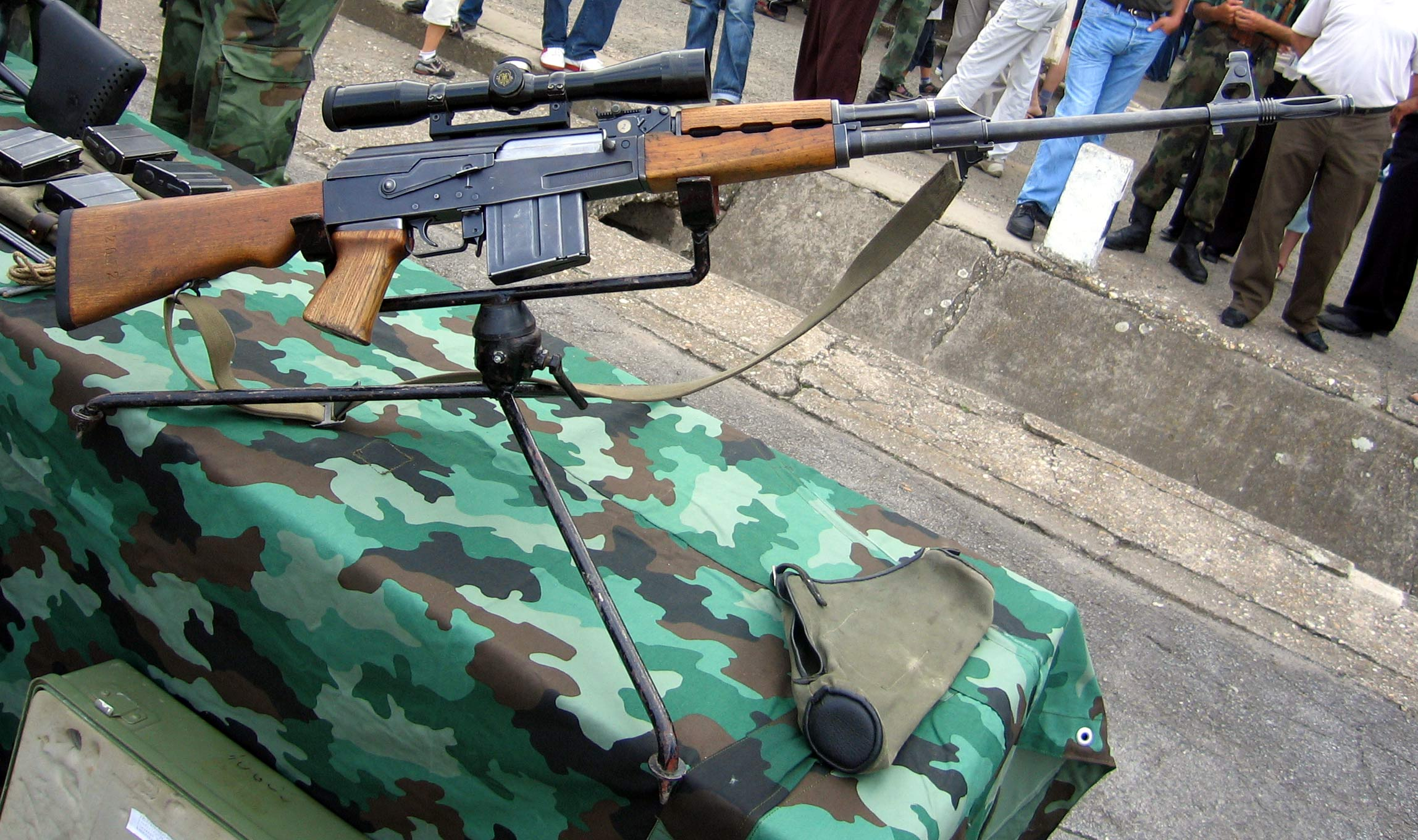 Снајперска пушка М76.